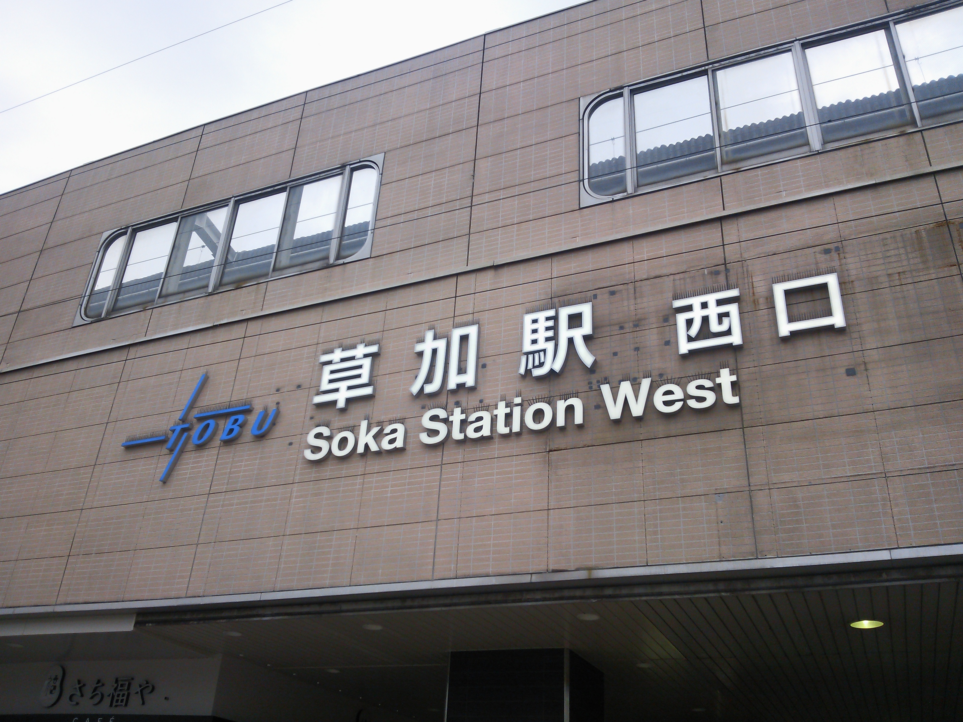 東武鉄道草加駅西口